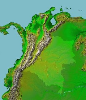 Ausschnitt des Bildes rechts thumb mit nur Kolumbien im Vordergrund